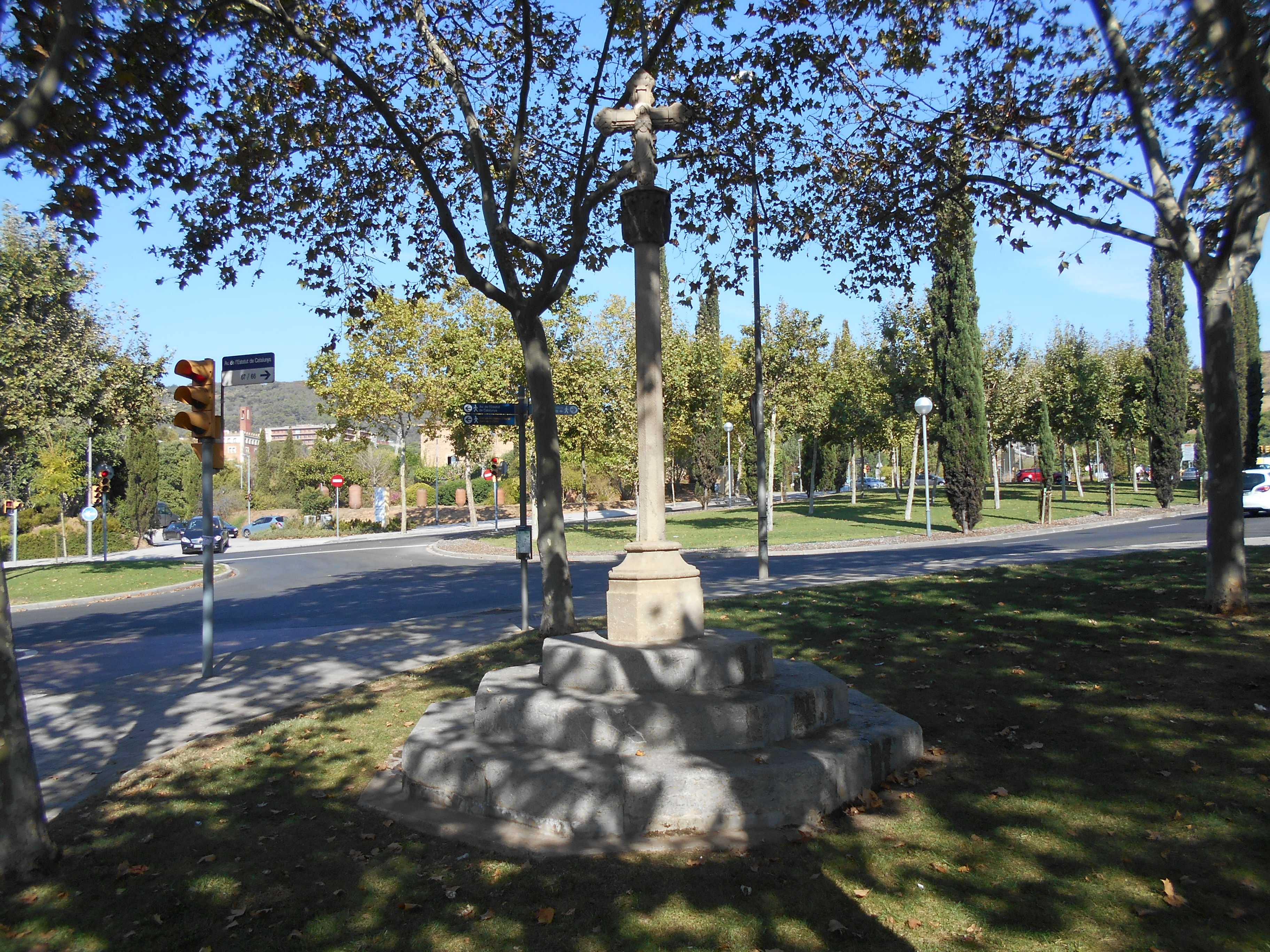 Cruz de término de Horta.